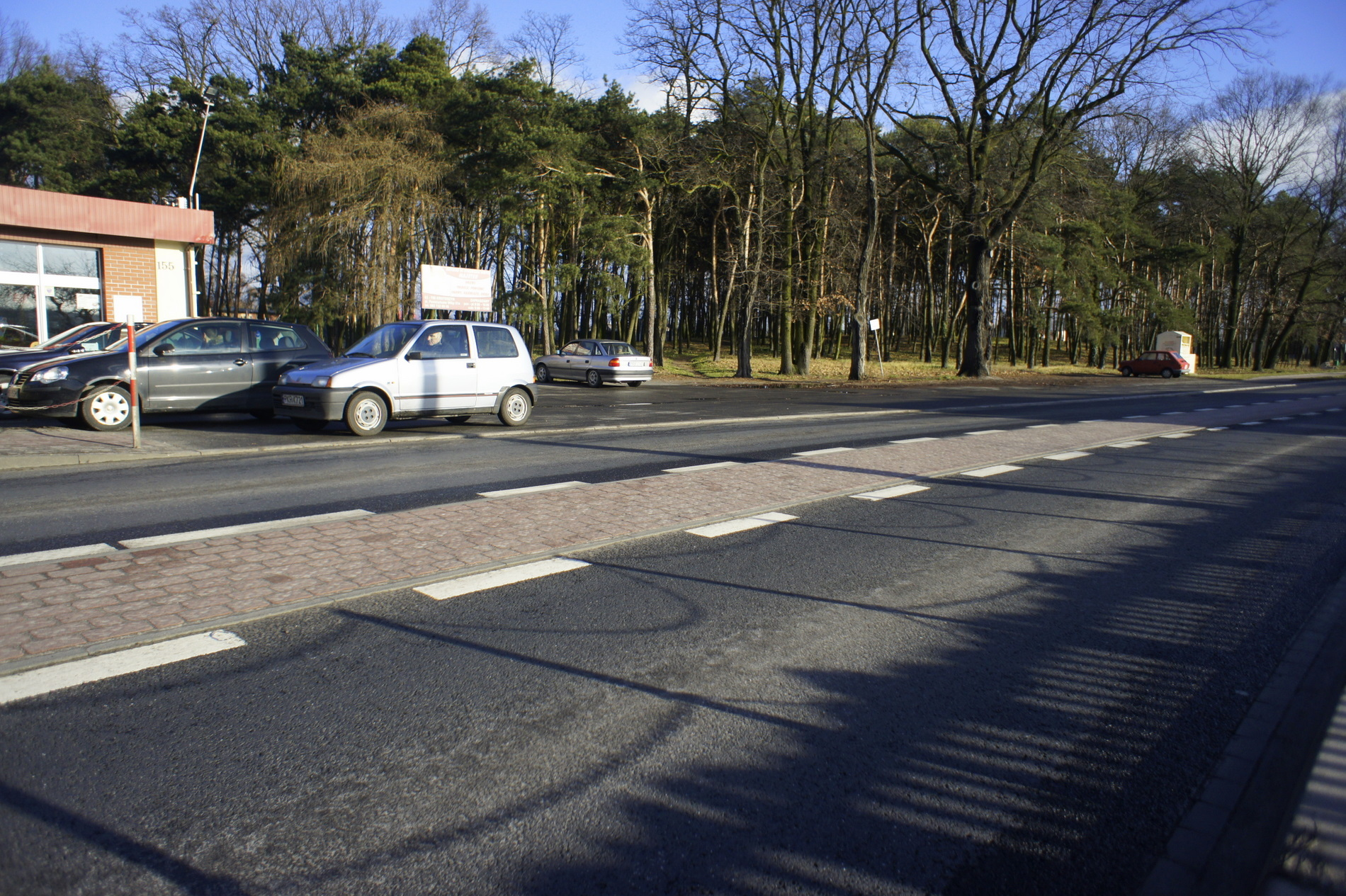 Krotoszyn, zieleniec przy ul. Ostrowskiej. Do II wojny światowej znajdował się na tym terenie duży cmentarz żydowski, miejsce ostatniego spoczynku rabina krotoszyńskiego Menachema Mendla ben Auerbacha (zm. 1689 r.), męczennika Mosesa Karpelesa z Pragi (zm. 1729 r.), słynnego rabina Chaima Jona z Wrocławia.